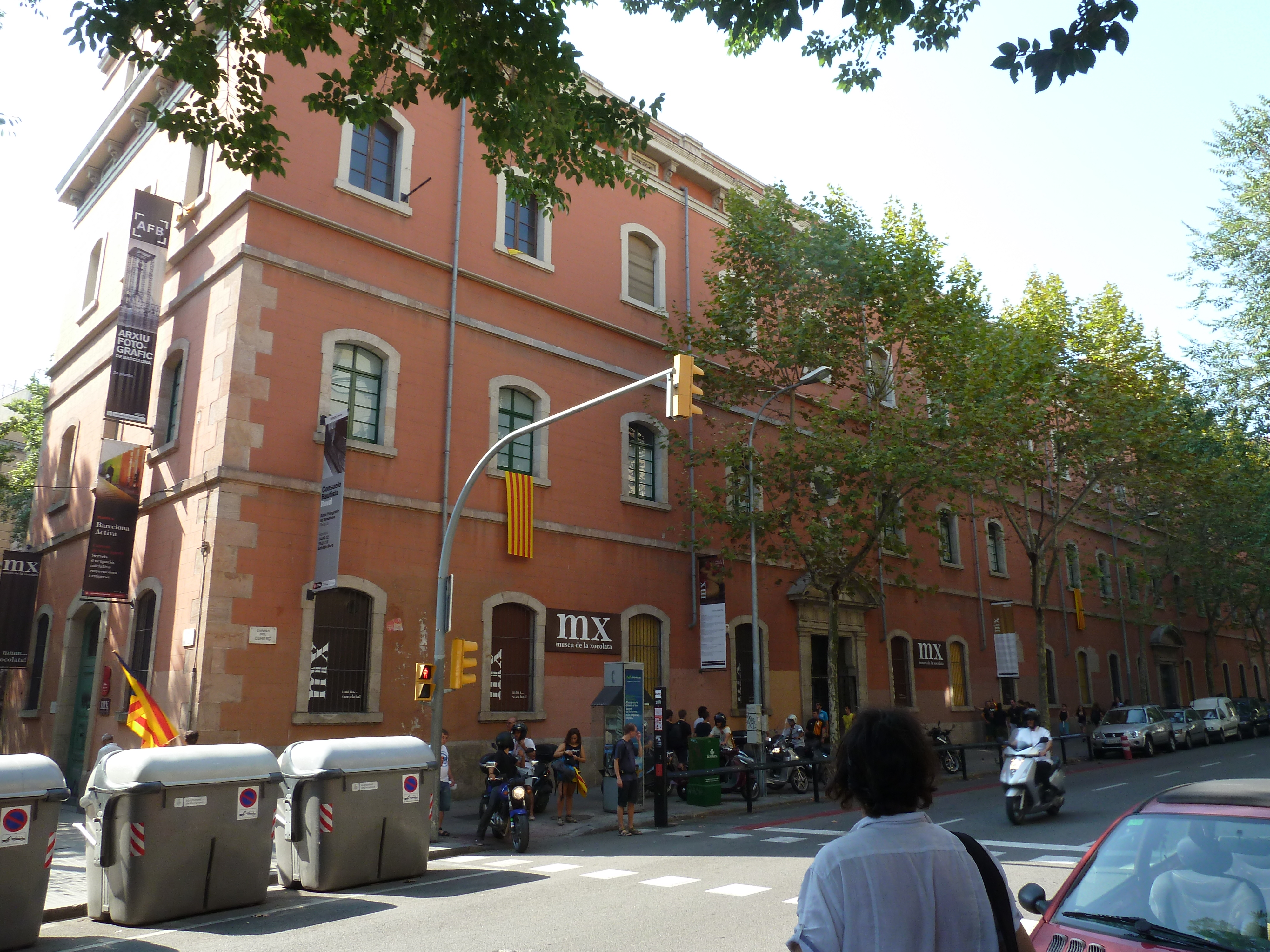 Barcelona